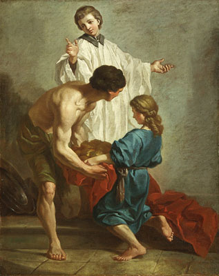 San Martín de Porres. (Debe advertirse que Martín de Porres, santo peruano nacido en Lima en 1579 y fallecido en 1639, fue el primer santo negro de América, dominico y por ello vestido con hábito blanco y capa negra, y habitualmente representado con una escoba)